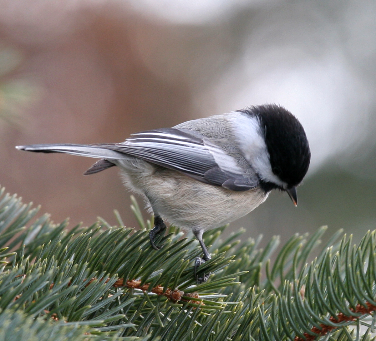 EXPLORE Jan. 29, 2009